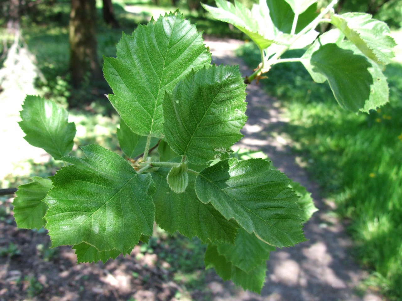 Karpatiosorbus latifolia